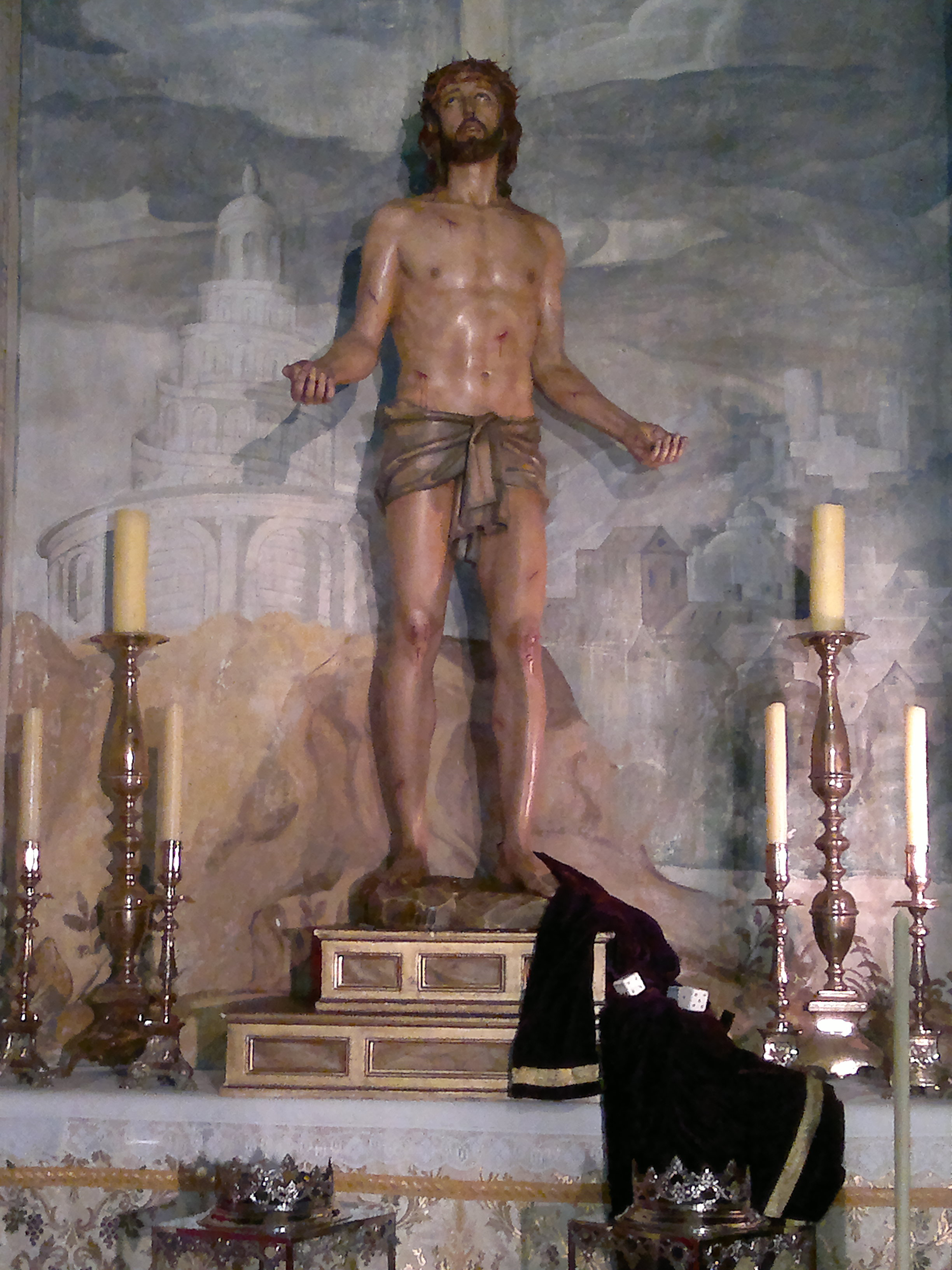 Stmo. Cisto Despojado (José Antonio hernández Navarro 1993) En su hornacina con el ornamento de cuaresma.